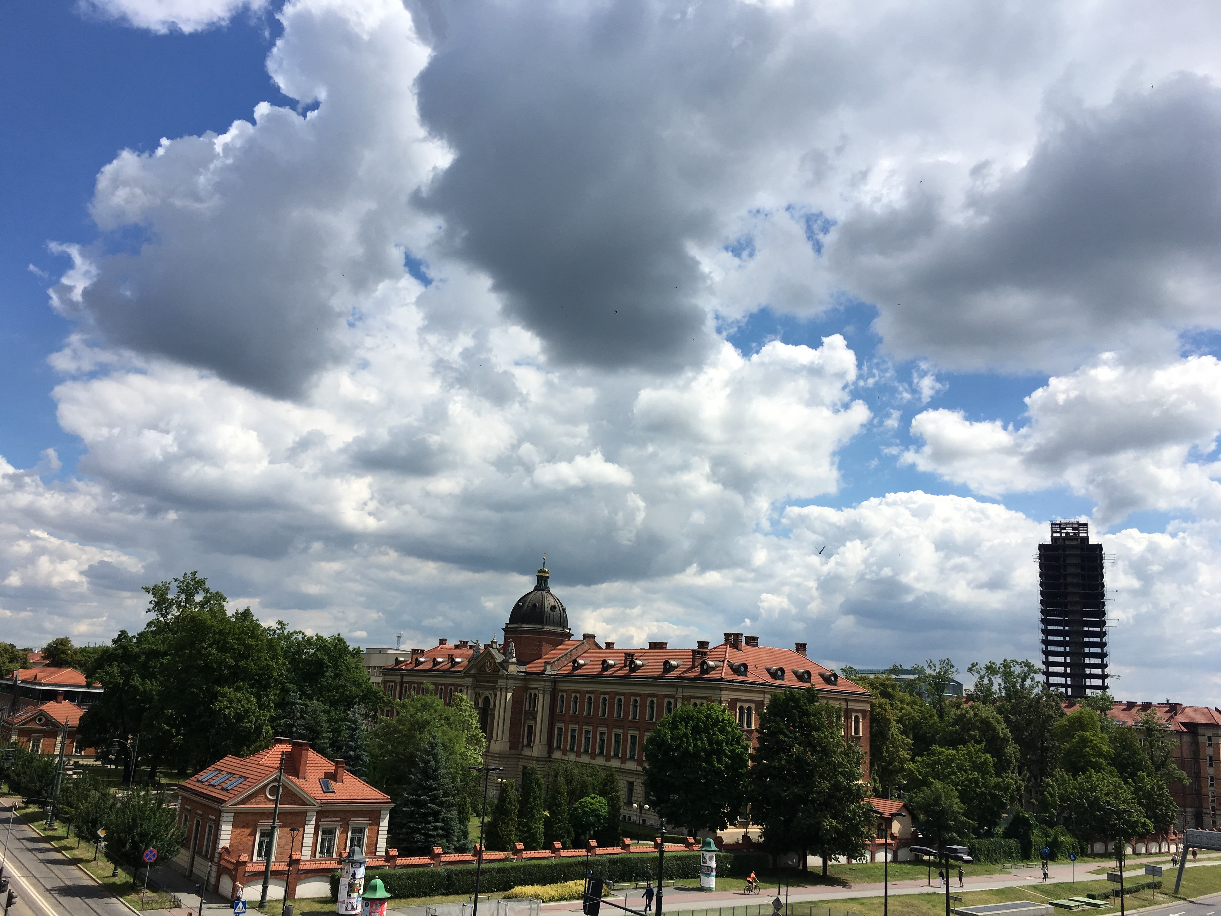 Kraków, schronisko Fundacji A. Lubomirskiego, 1888-1893